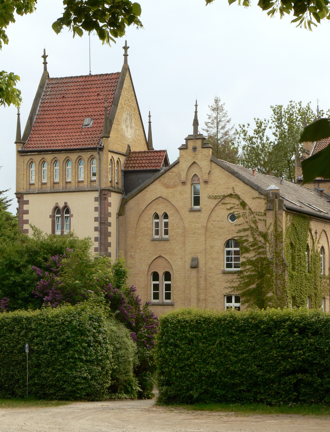 Turmanbau Schloss Imbshausen